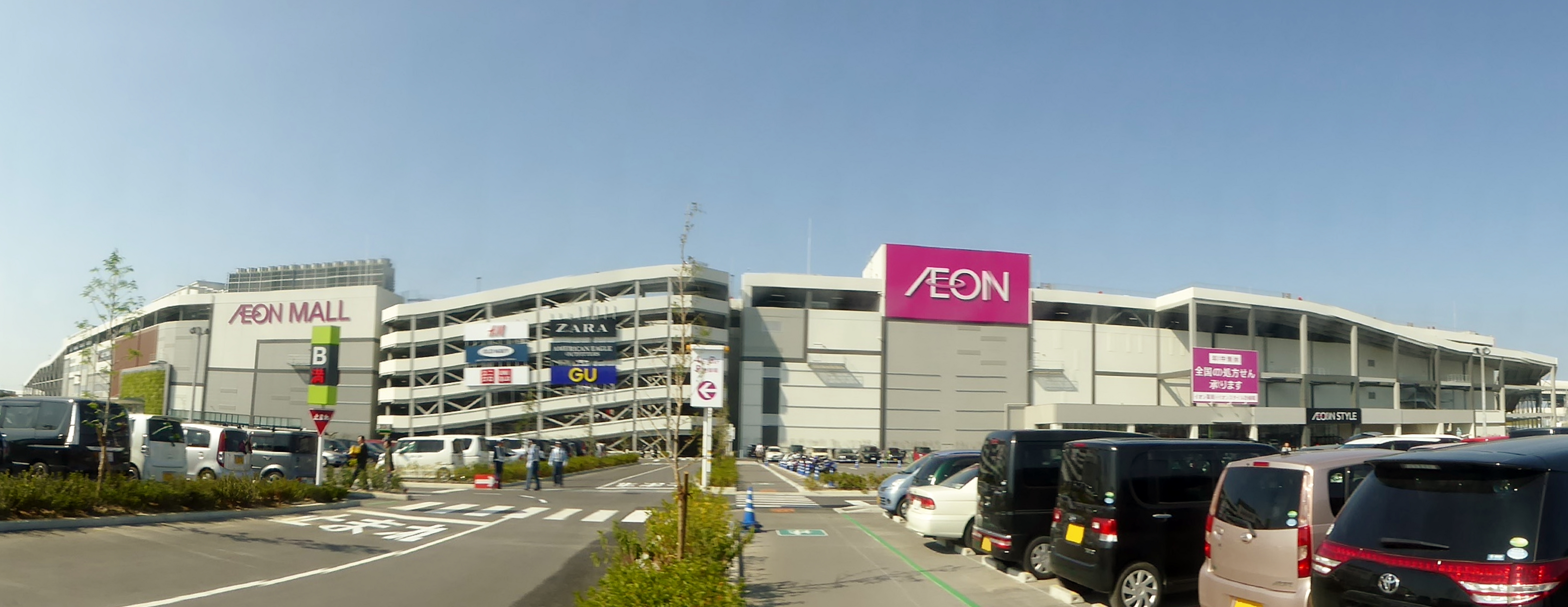 イオンモール四條畷を撮影。